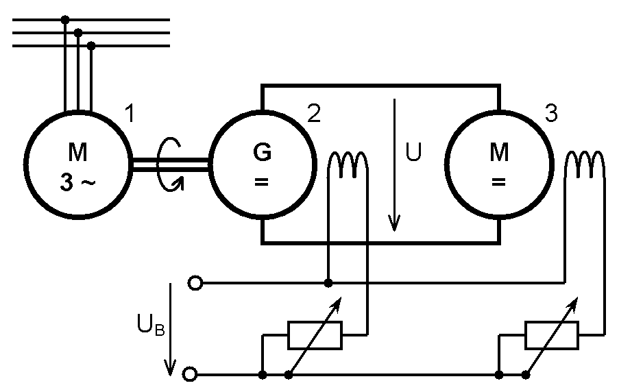 Ward Leonardovo soustroji, obkresleno z prednasek